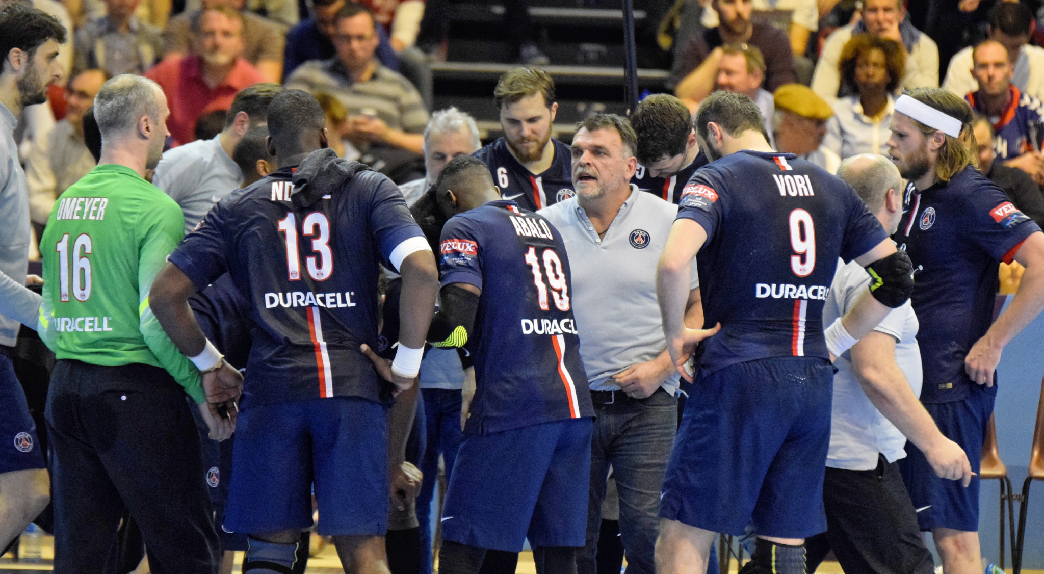 Rencontre de ligue des champions 2014-15 entre le PSG et Veszprem. A la Halle Carpentier (Paris), le 12 avril 2015.